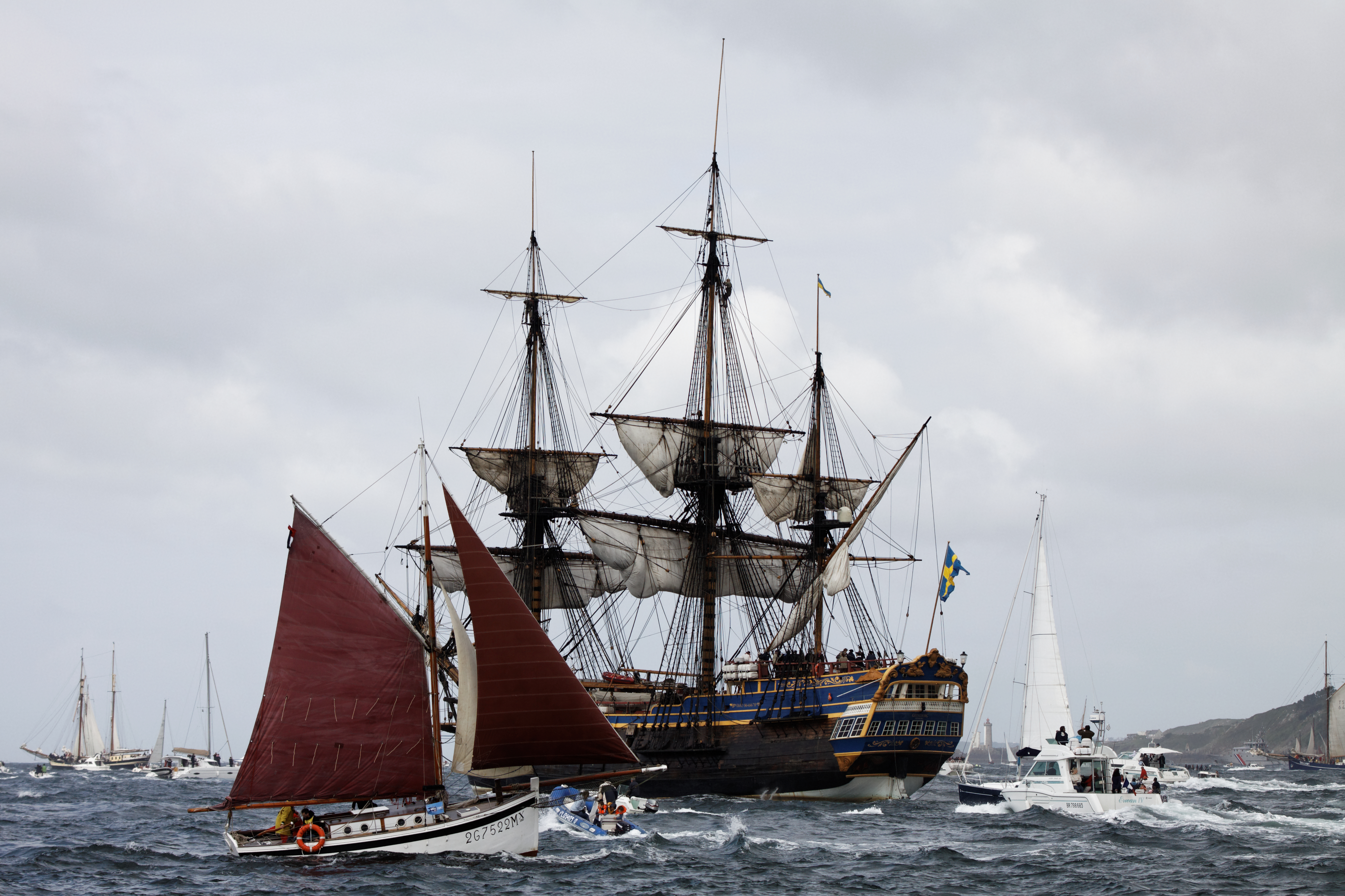 La grande parade des Tonnerres de Brest 2012 dans la rade de Brest en direction de Douarnenez : Au premier plan le Tréas, devant le Götheborg